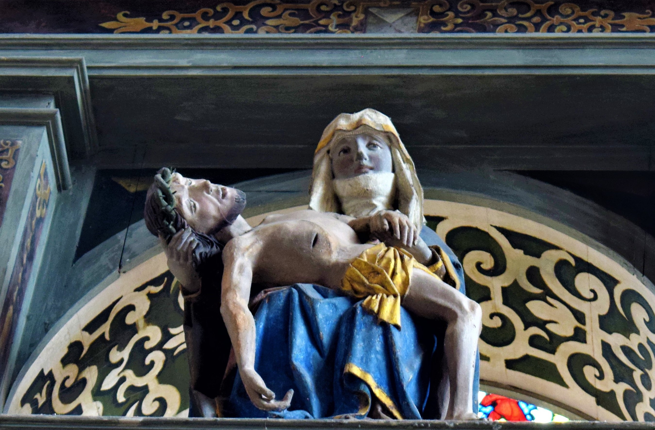 Rieterkirche Kalbensteinberg, Hochaltarretabel, Pietà von 1470 im Altarauszug